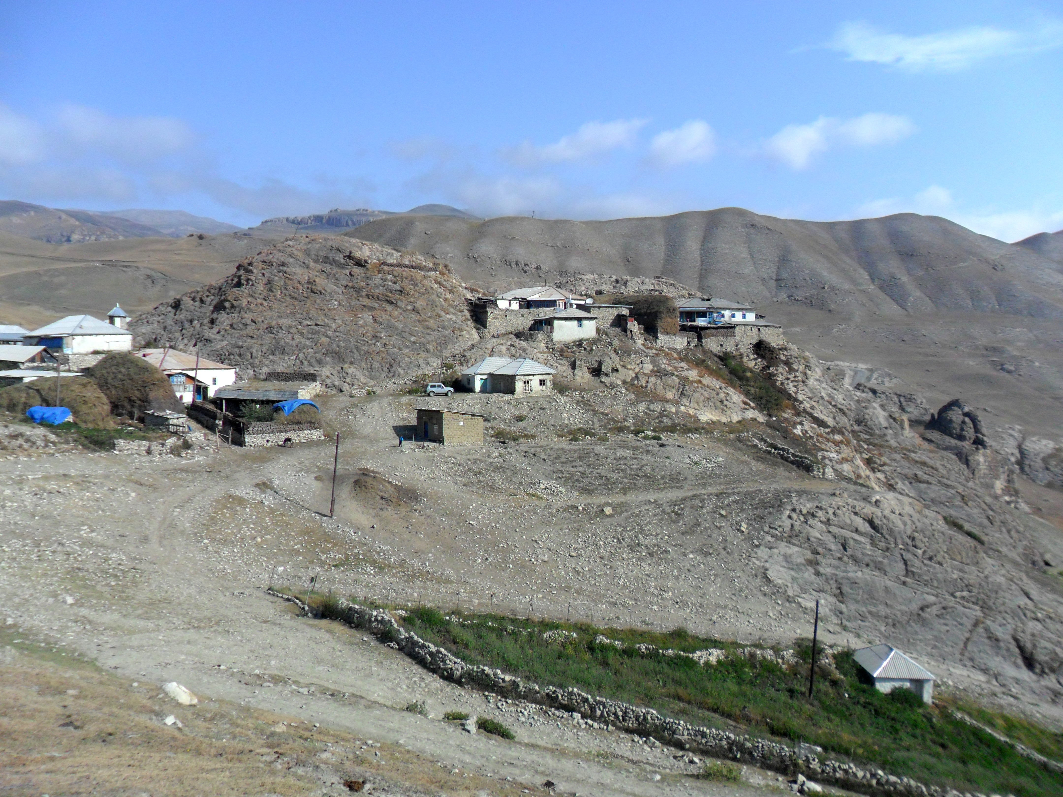 Cek kəndi, Quba, Azərbaycan